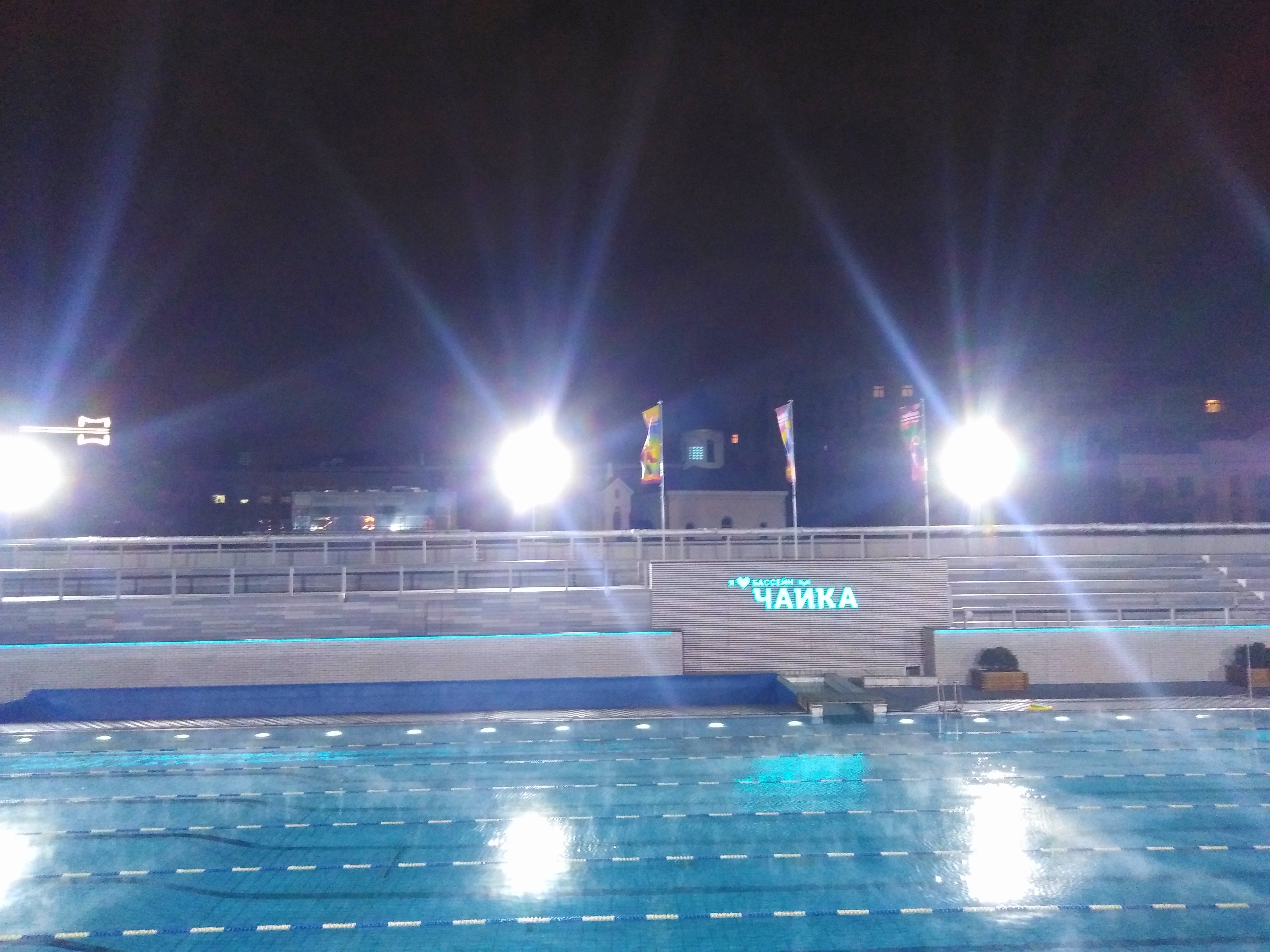 бассейн чайка зимой 2020, вид на 50-метровый бассейн.